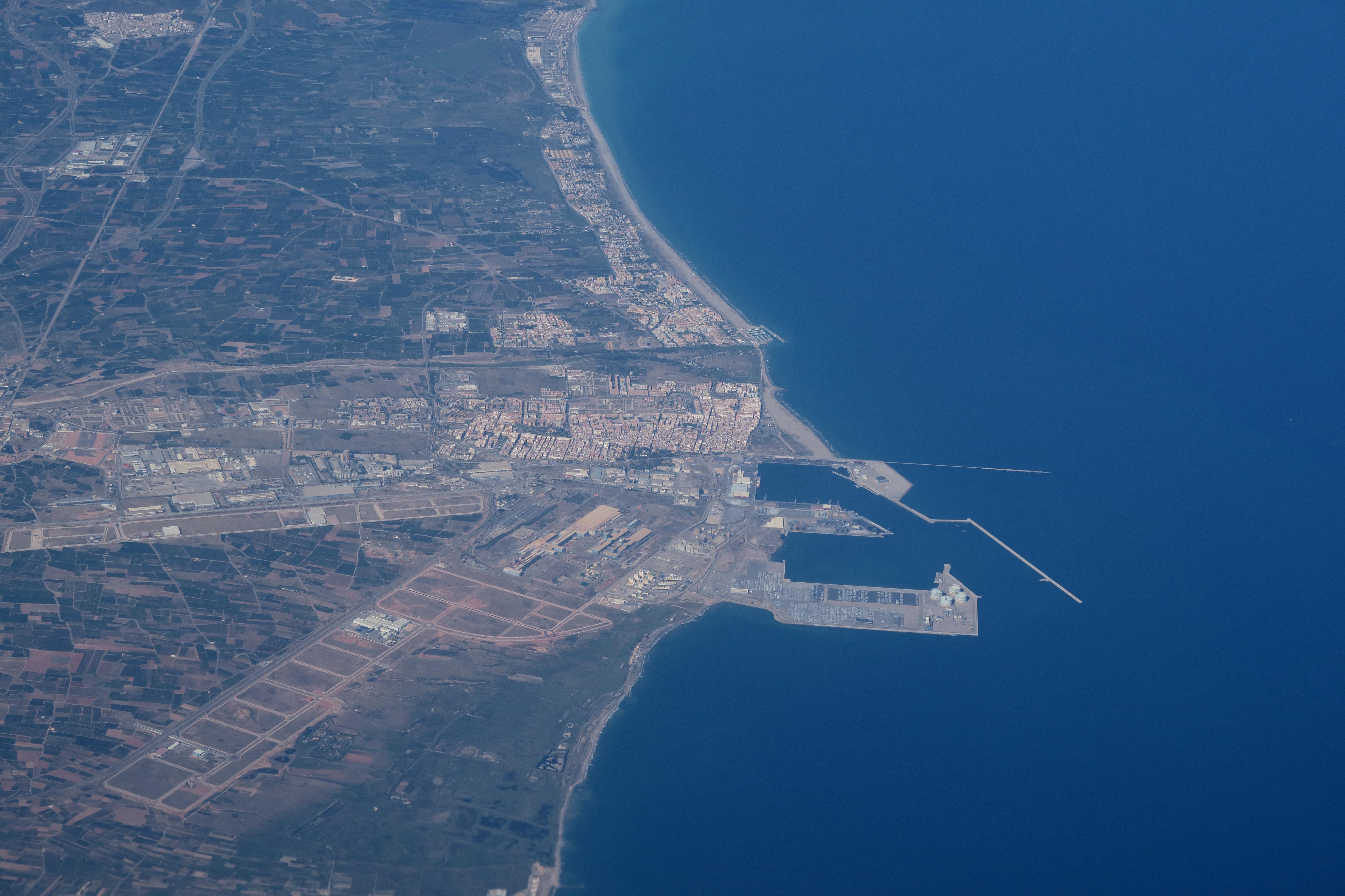 Puerto de Sagunto, vista aérea